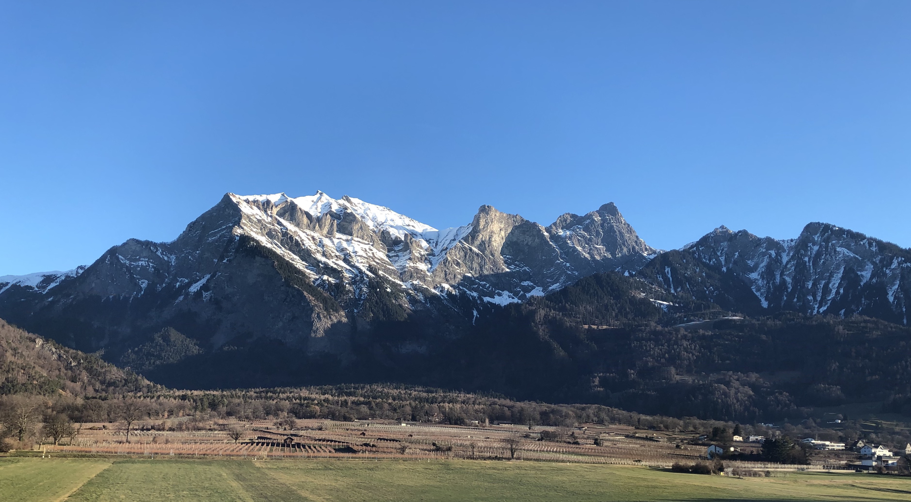 Falknis von Südwesten